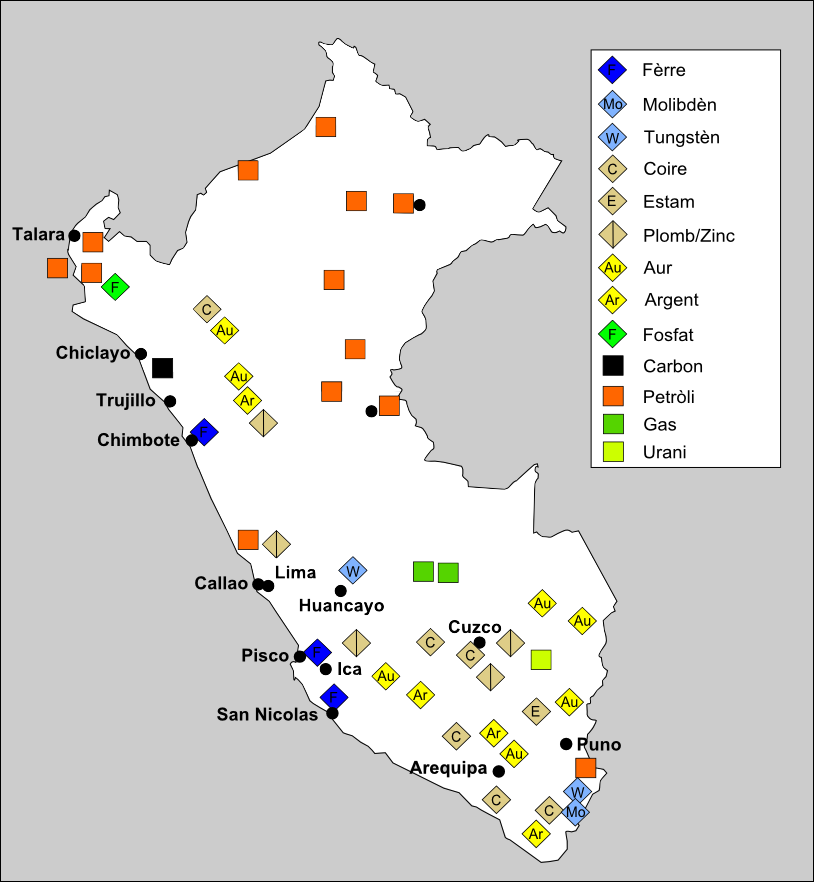 Ressorsas naturalas principalas de Peró.